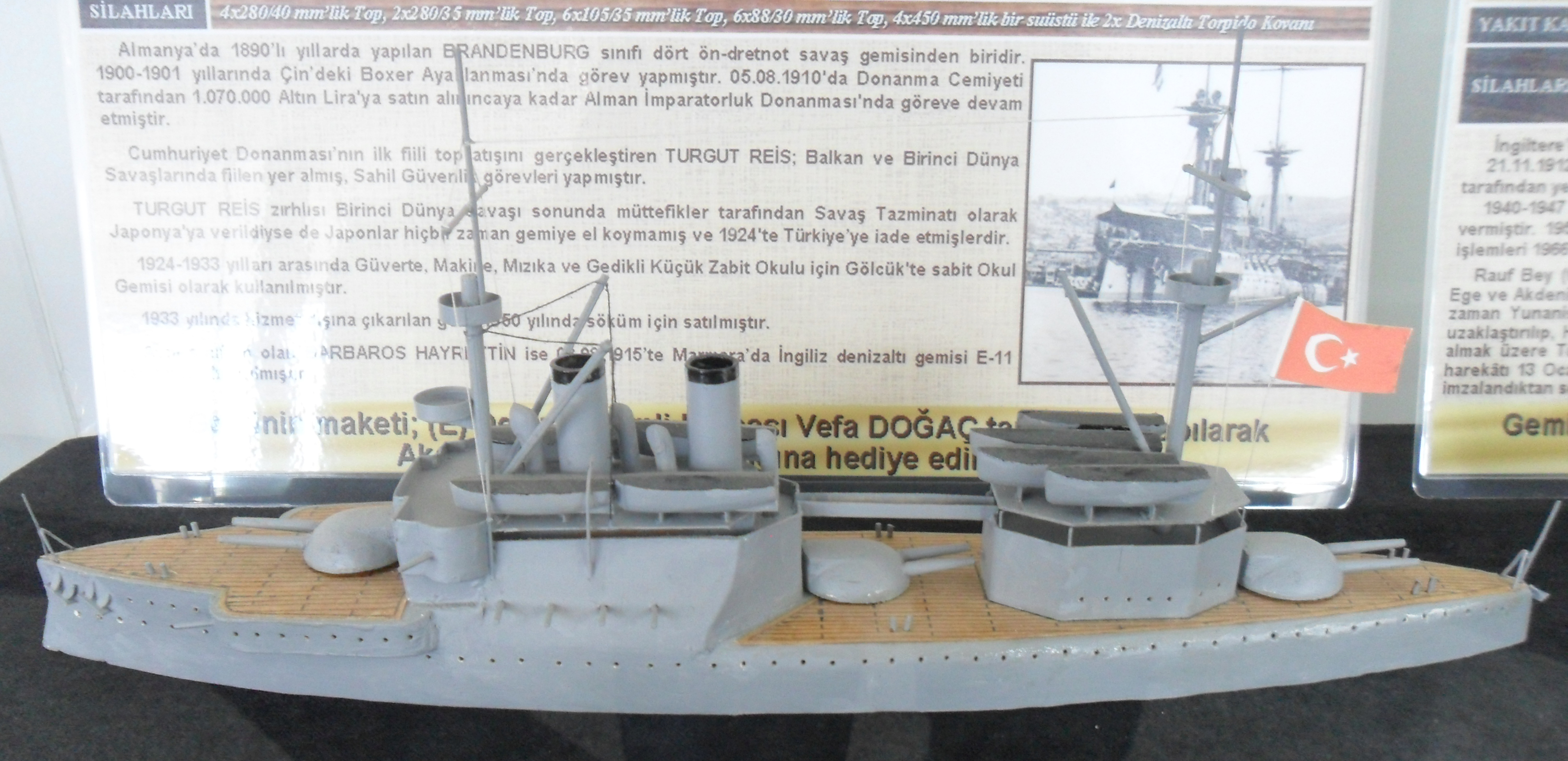 Mersin Deniz Müzesinde sergilenmekte olan Turgut Reis maketi.